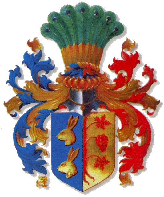 Wappen der von Maltza(h)n